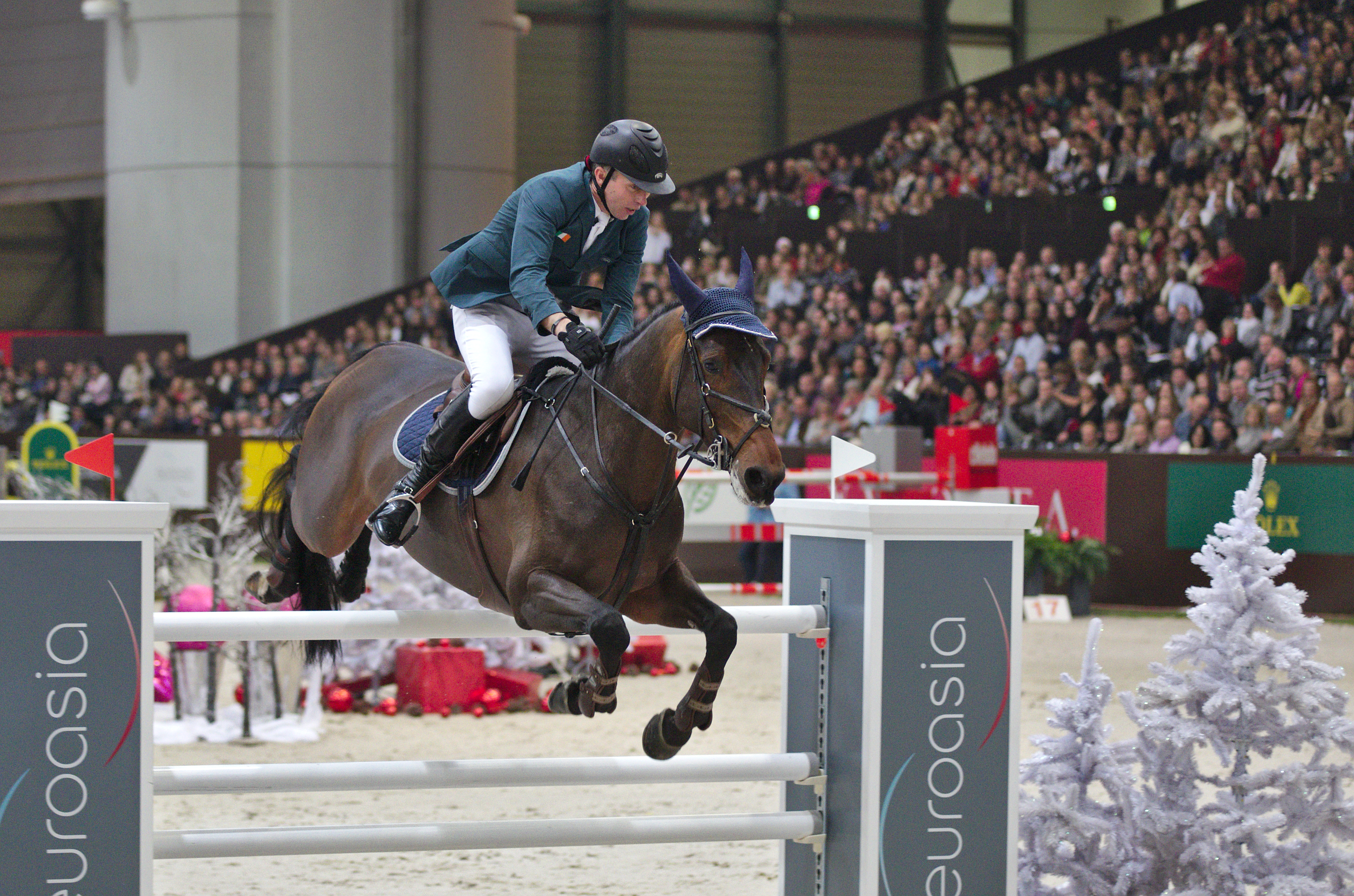 CHI Genève 2013 - 20131214 - Dermott Lennon et Loughview Lou-Lou